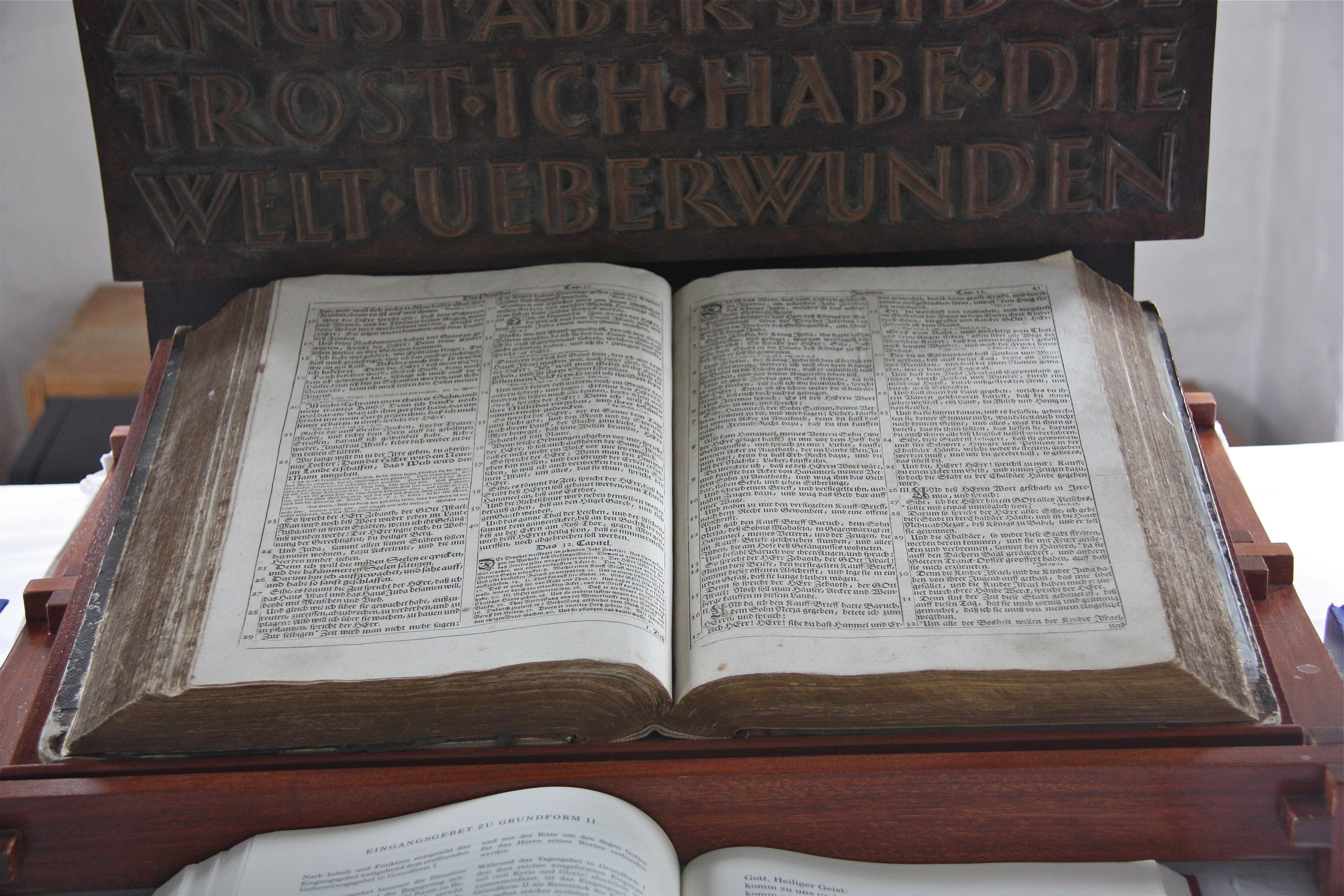 Sankt Johannis, Hamburg-Neuengamme, AltarbibelThis is a photograph of an architectural monument.